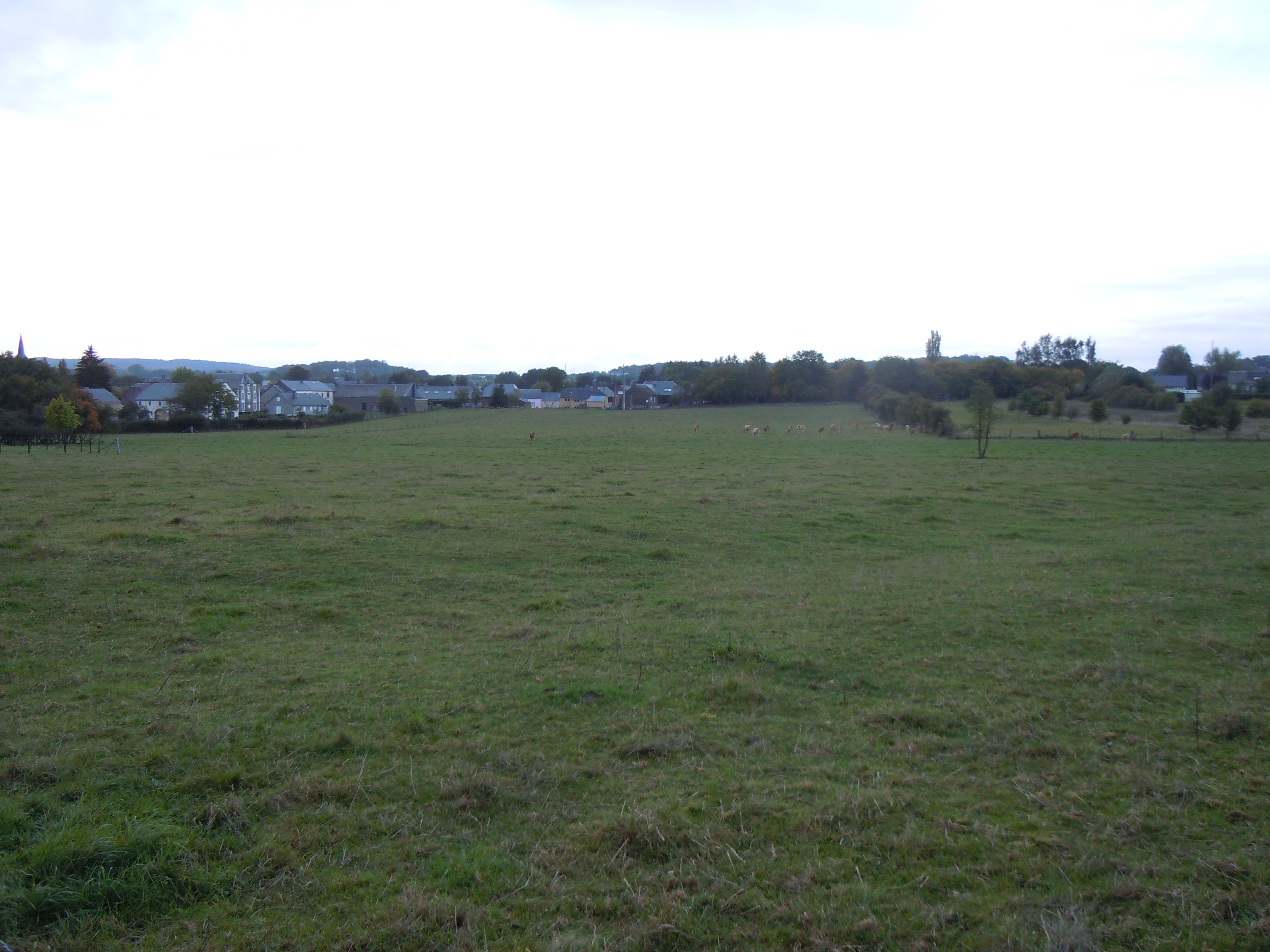 Le village belge de Hondelange vu du sud-est